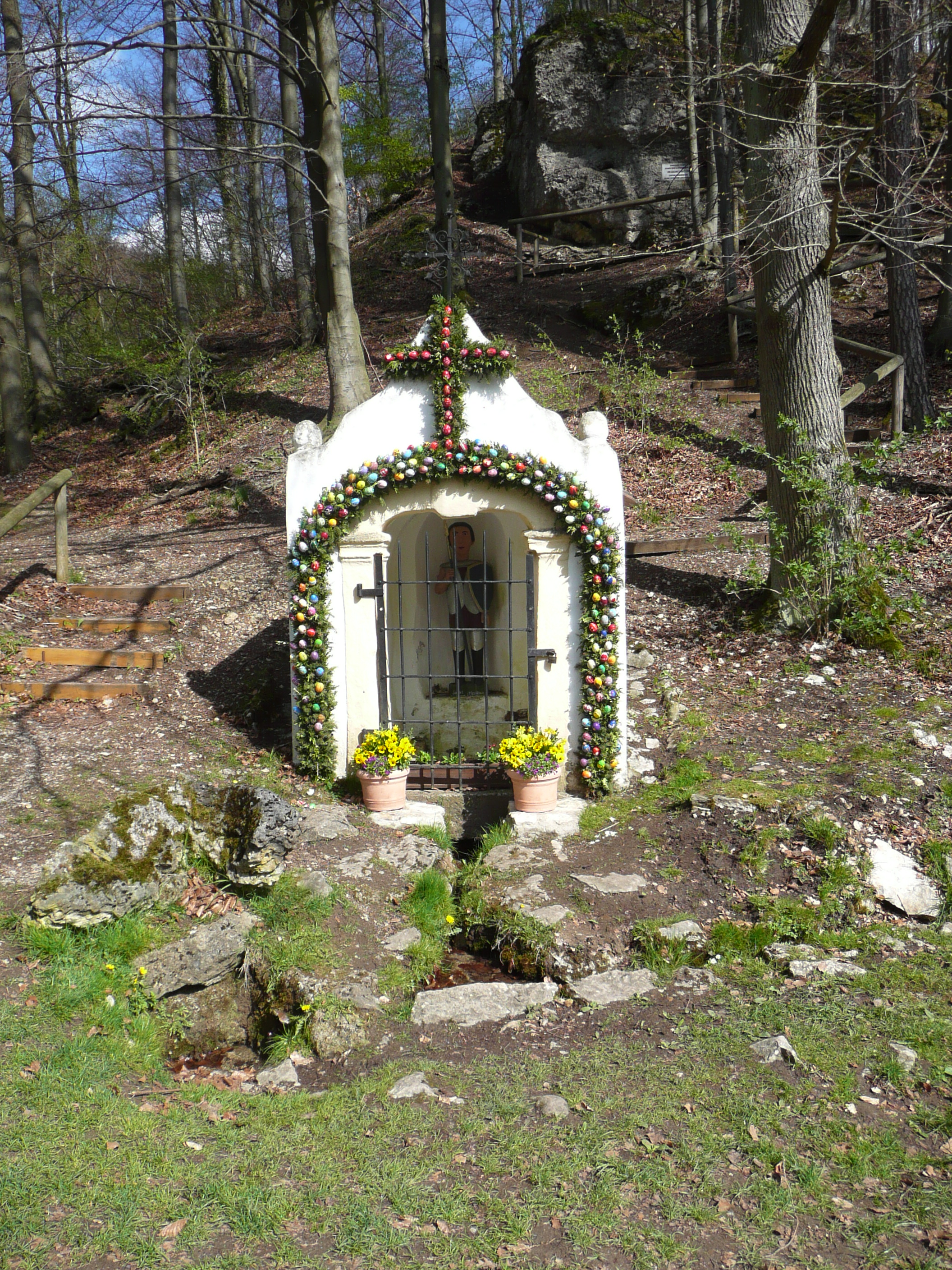 Moritzbrunnen, kleiner verputzter Kapellenbau, Satteldach mit geschweiftem Giebel, Mitte 18. Jahrhundert; mit Ausstattung.